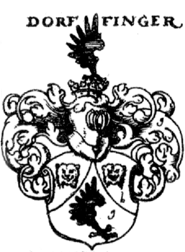 Wappen des schlesischen Adelsgeschlechts derer Dorffinger (Dorfinger).